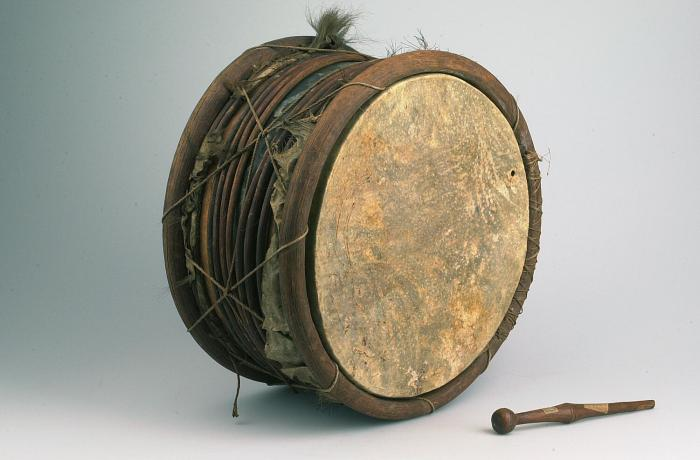 Slaginstrument. Dubbelvellige cilindrische trom